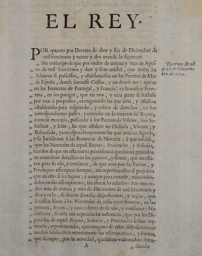 Filipe V.a Gaztelako Erregearen 1722ko dekretuko lehendabiziko orrialdea, Hego Euskal Herriko aduanak kostaldera eta Frantziako mugara eramaten dituena; Gipuzkoako Probintziako kopia (1728).